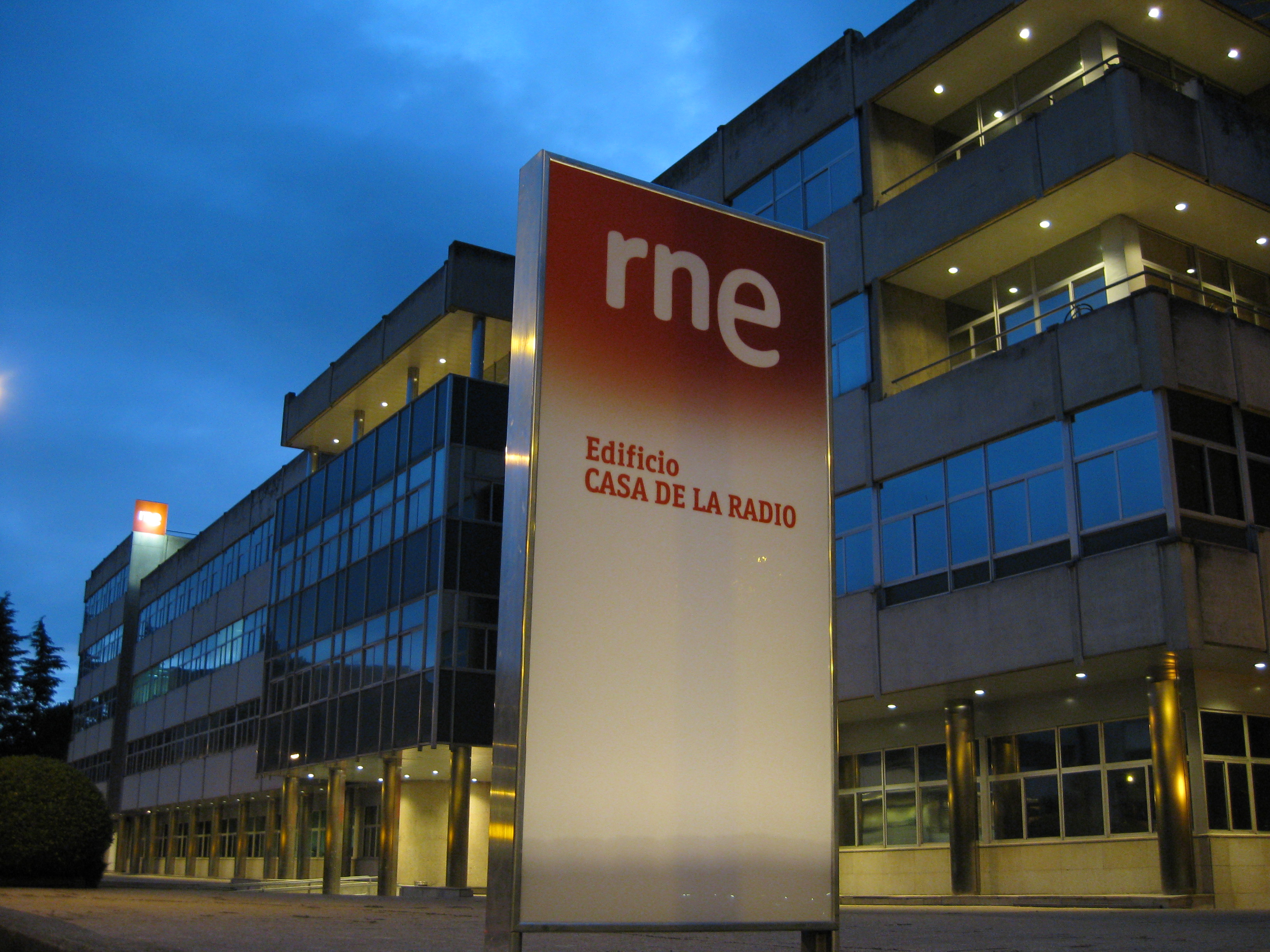 Fachada de la Casa de la Radio, sede central de Radio Nacional de España en Pozuelo de Alarcón (Madrid)